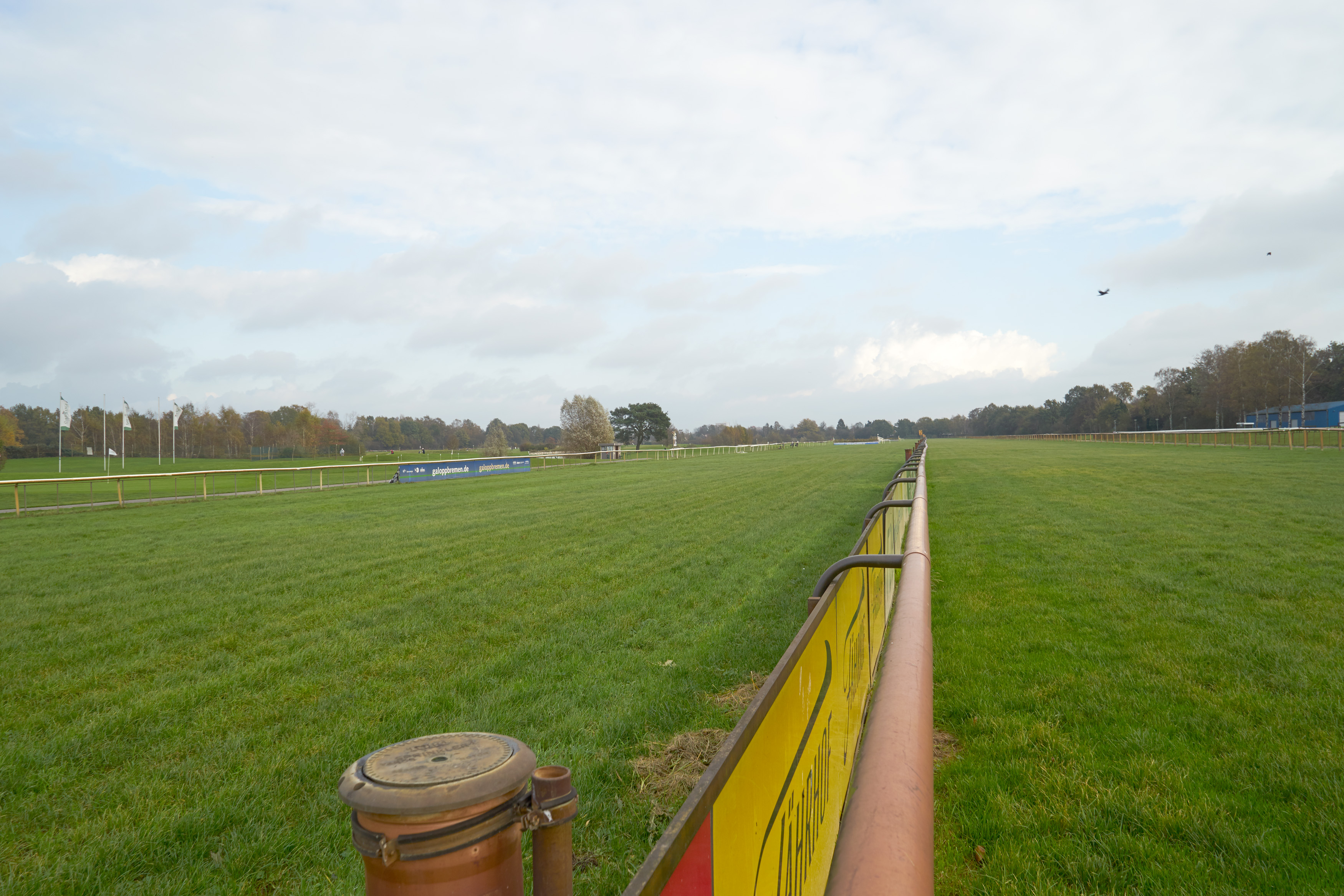 Galopprennbahn Bremen. Rennbahn aus Richtung SO kommend in Höhe der Tribüne